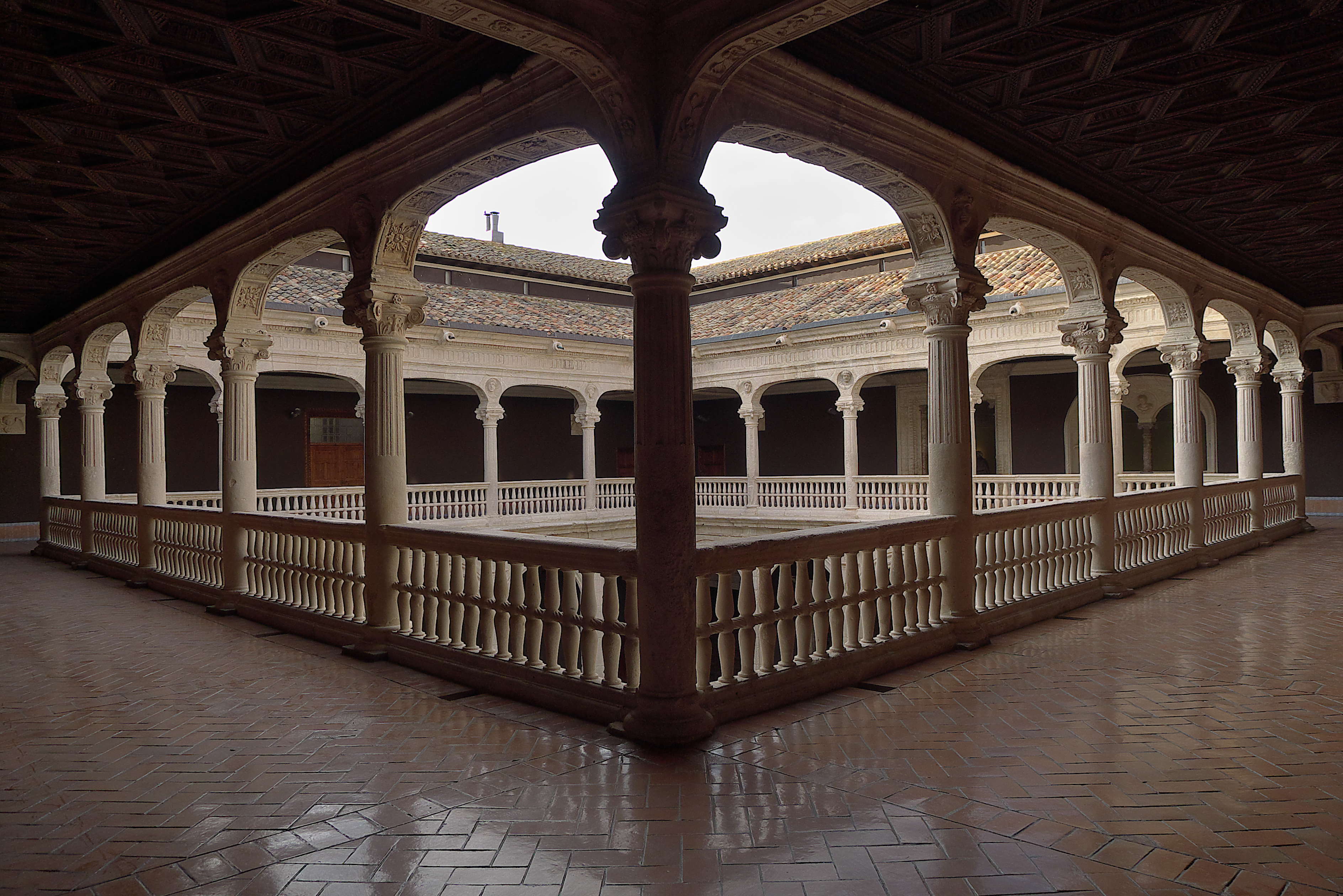 Piso superior. Un desarrollo plenamente renacentista empleando el arco carpanel, datado en el primer tercio del XVI.